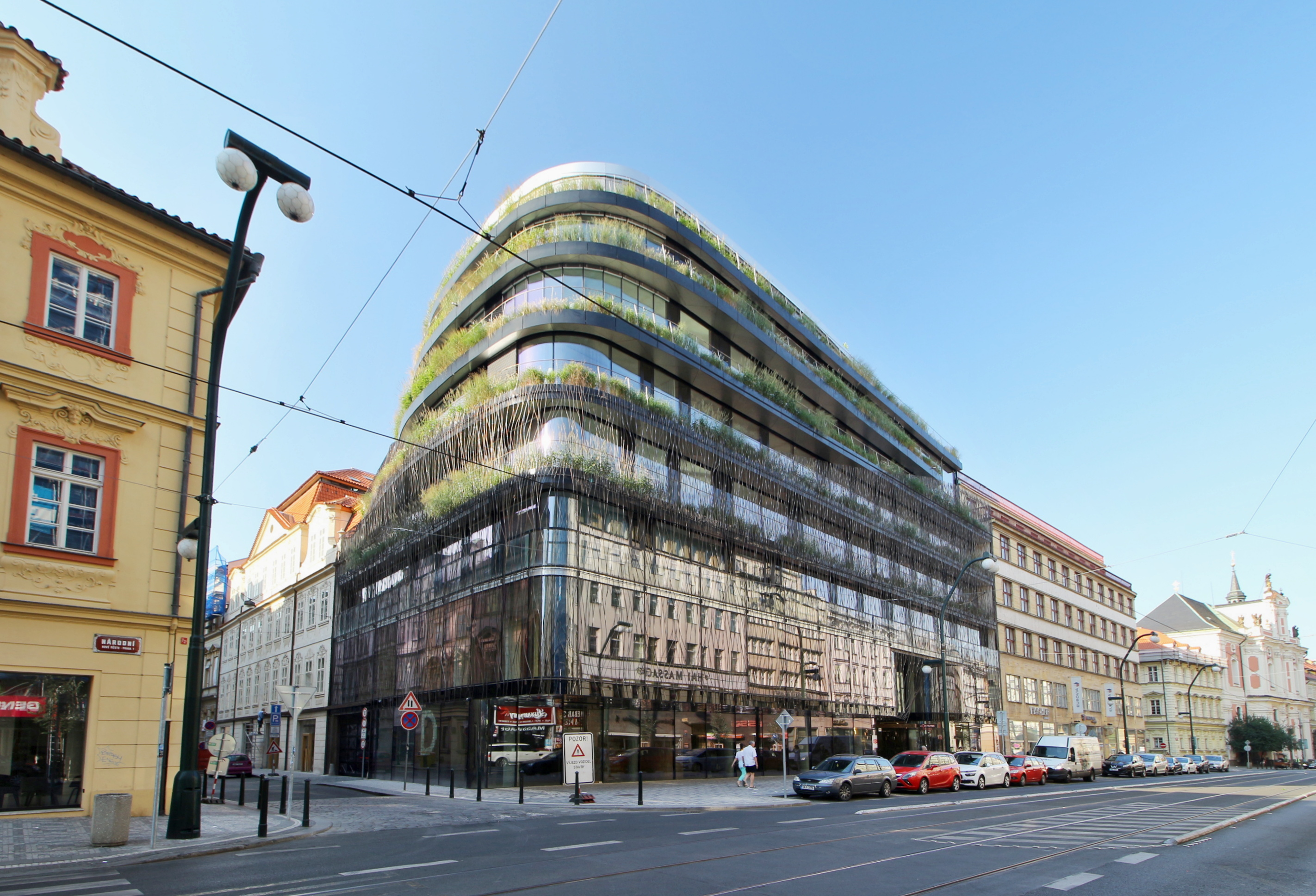 Praha-Národní, Palác DRN